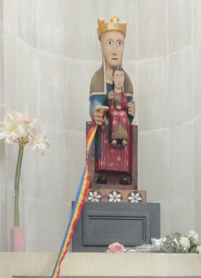 Mare de Déu de Meritxell al Santuari nou de Meritxell